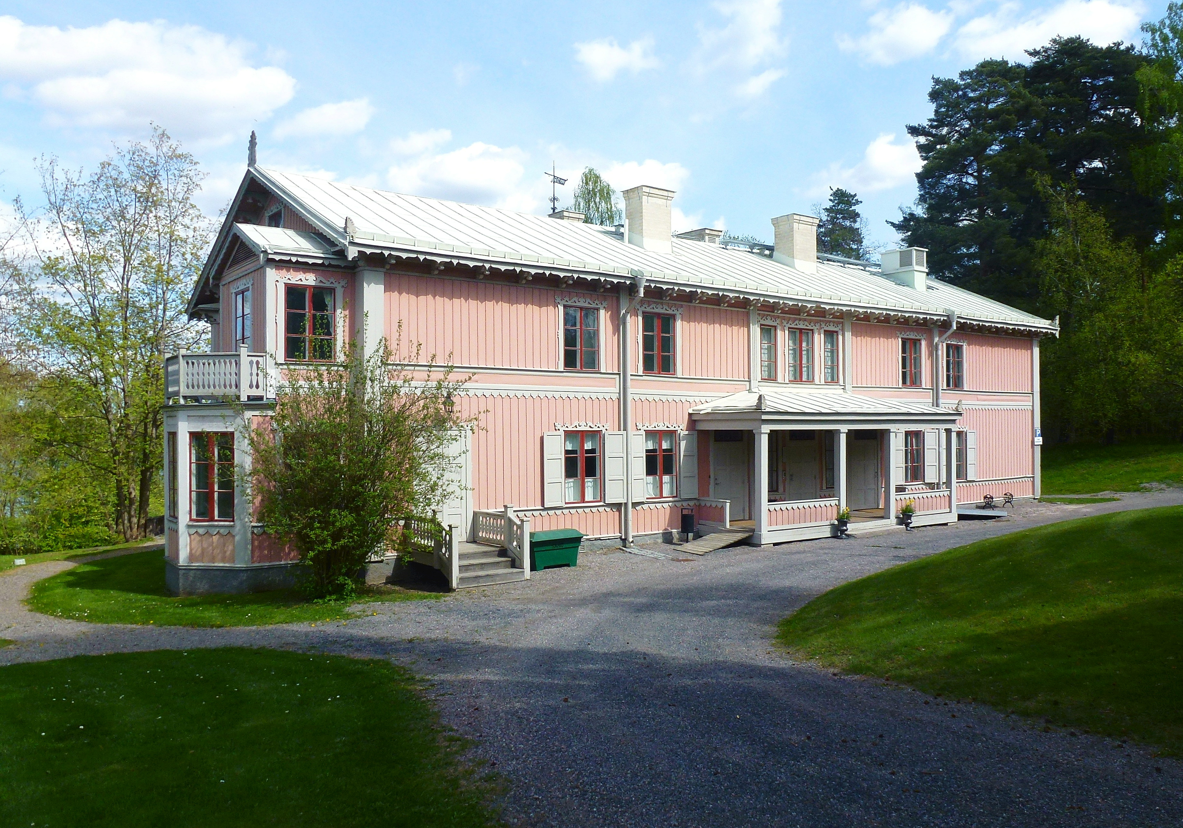 Sköntorp Ulriksdal